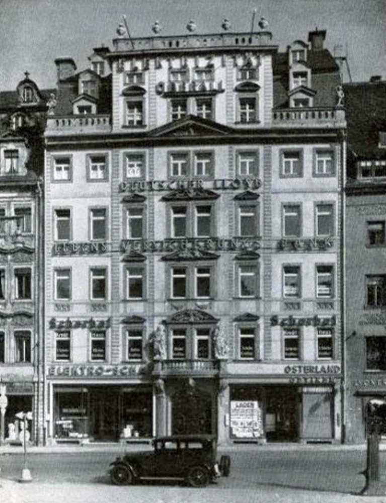 Jöchers Haus in Leipzig um das Jahr 1930